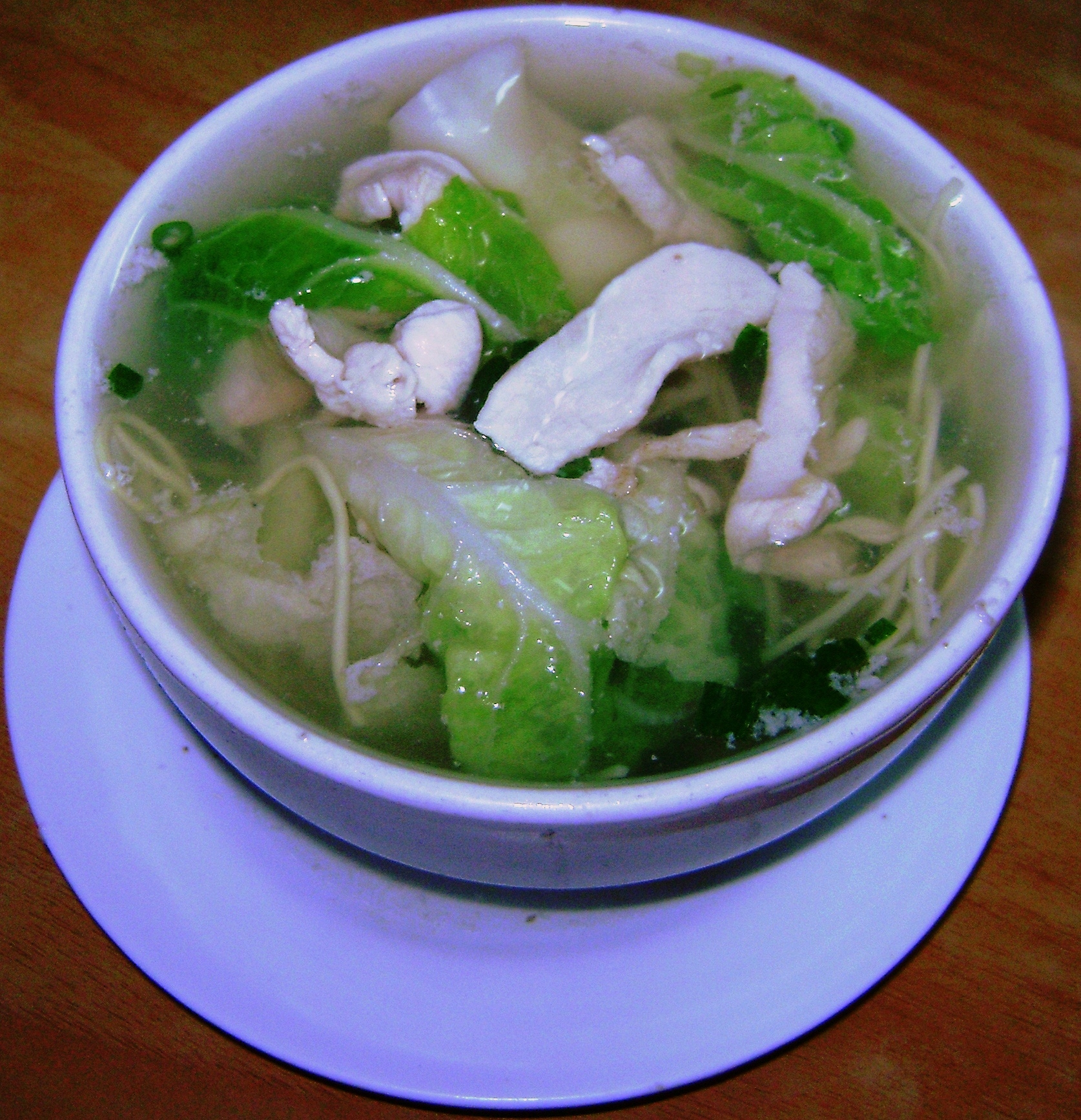 Sopa wantan. Lima, Perú.